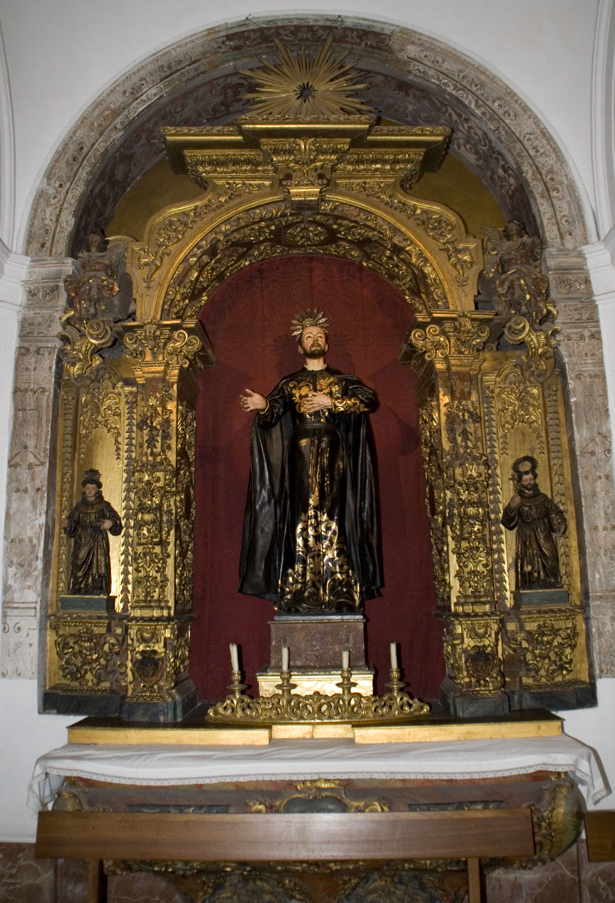 Capilla de San Francisco Caracciolo. Iglesia de Santa Cruz.